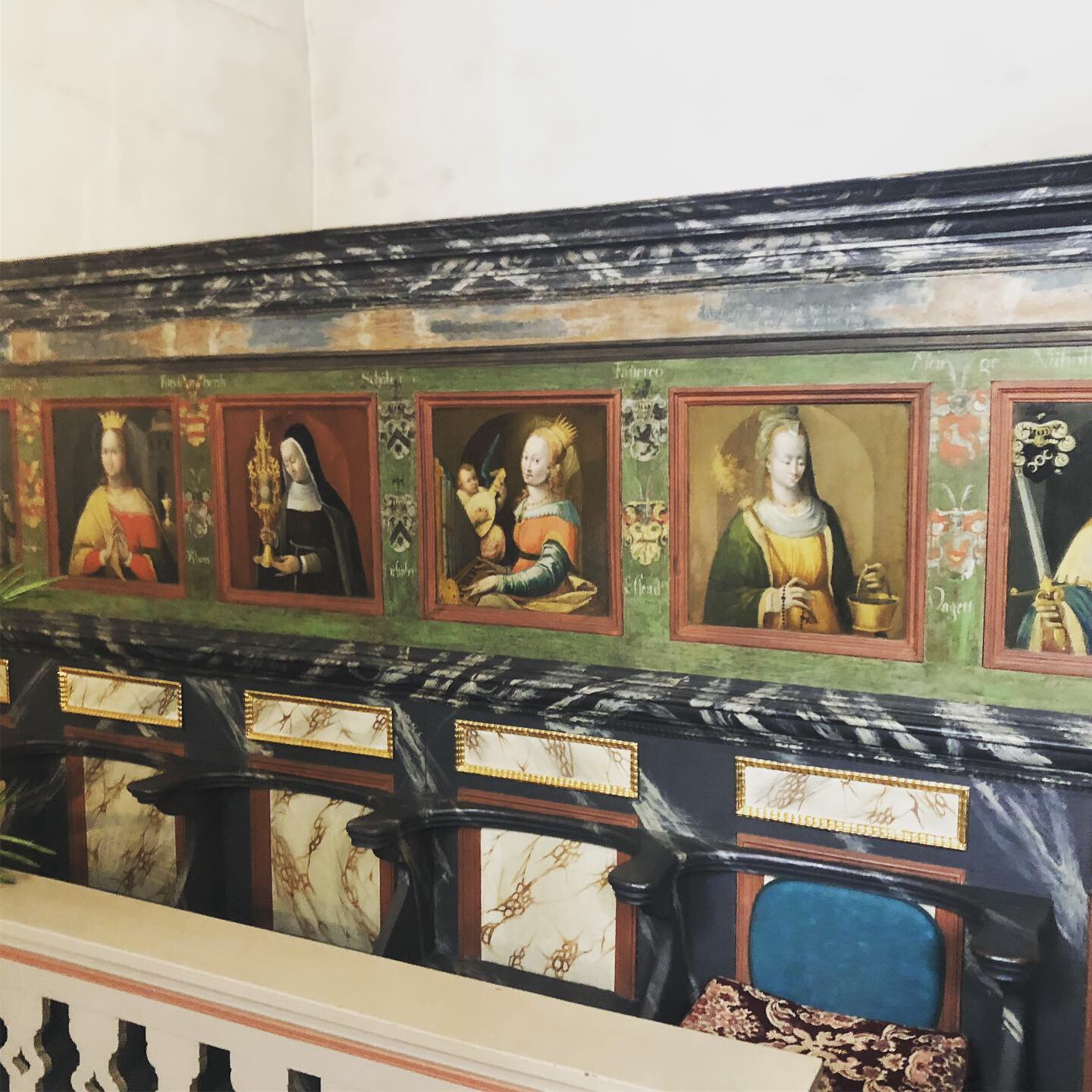 barocke Bildergalerie mit Heiligen sowie Familinwappen der Priorinnen und Konventualinnen in der Apsis der Klosterkirche